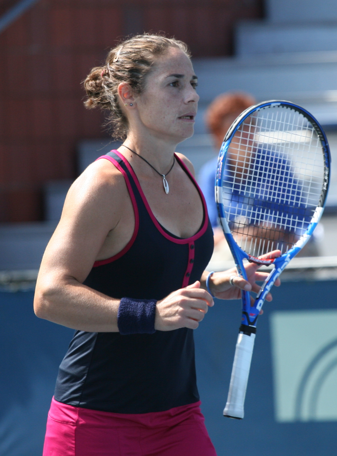 U.S. Open Sunday, Sept. 6, 2009